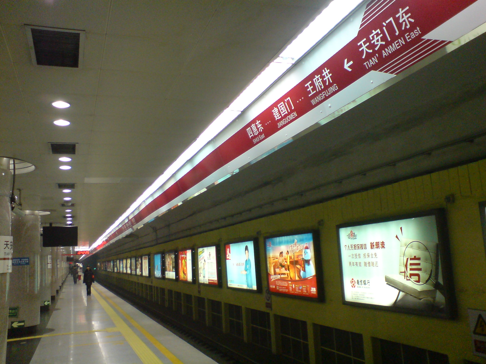 中文（中国大陆）: 北京地铁1号线天安门东站站台